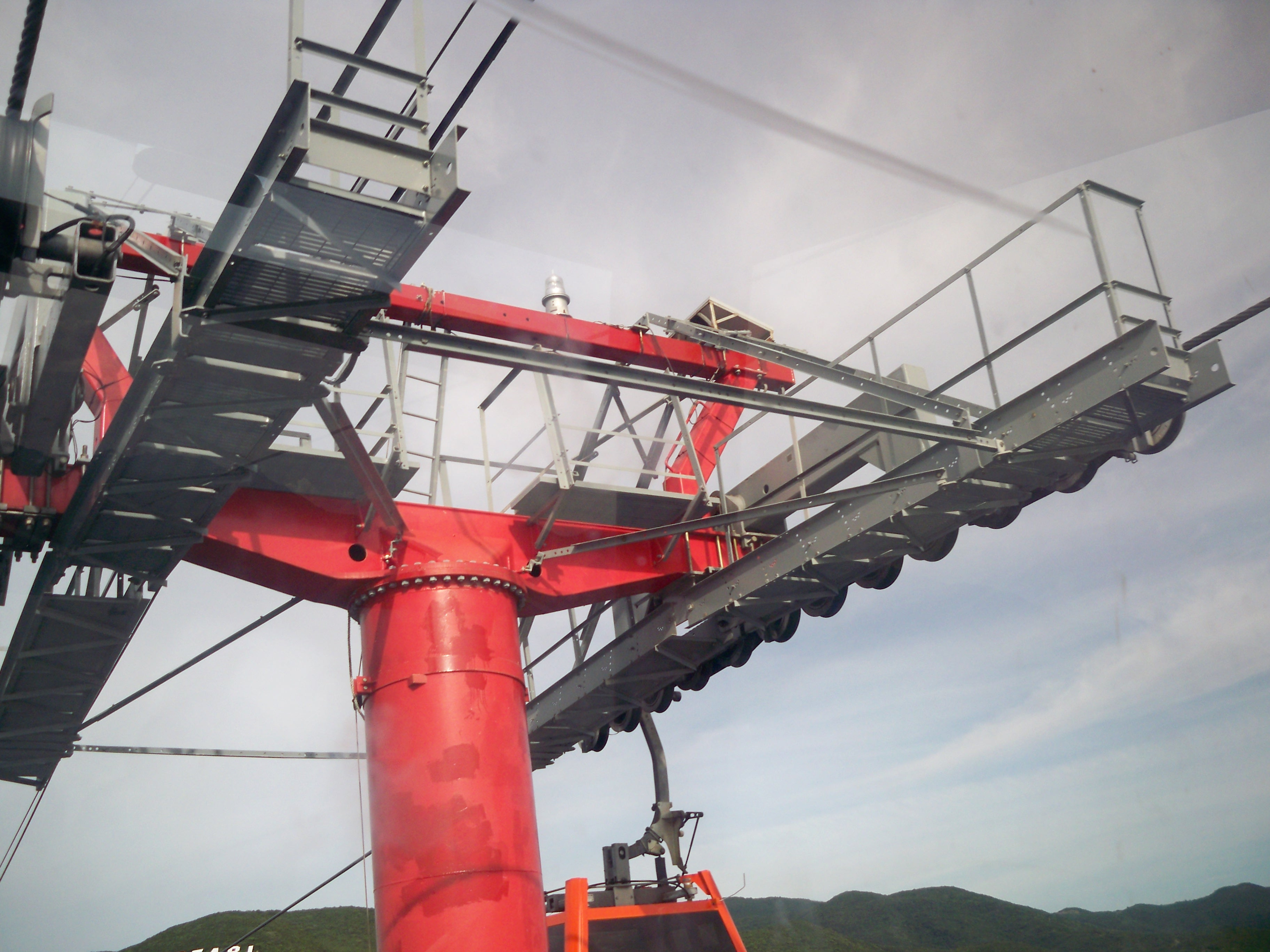 Cáp treo Vinpearland